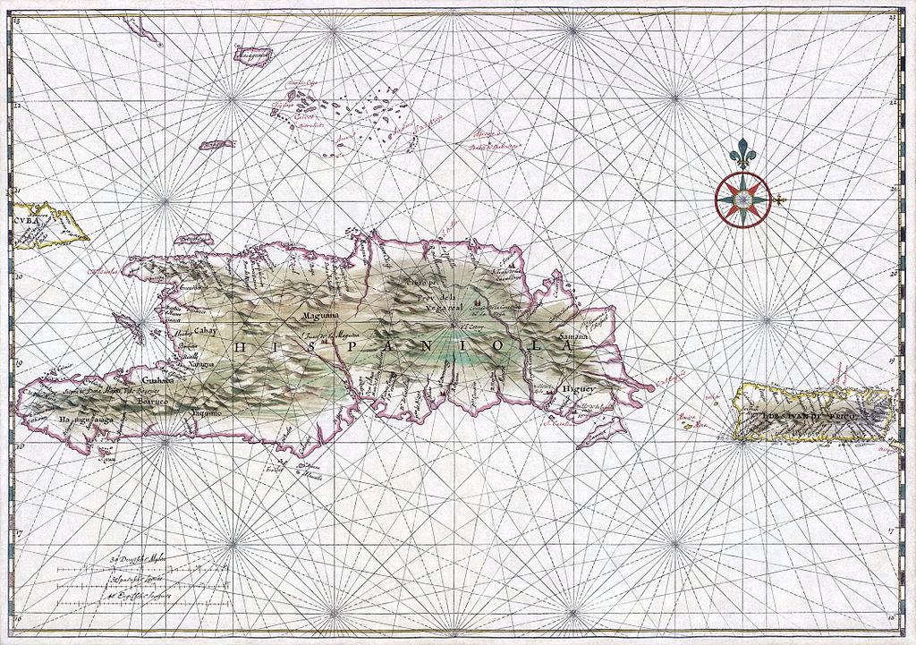 Johannes Vingboons